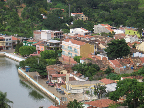 O Cine Teatro Guarani, ao centro.